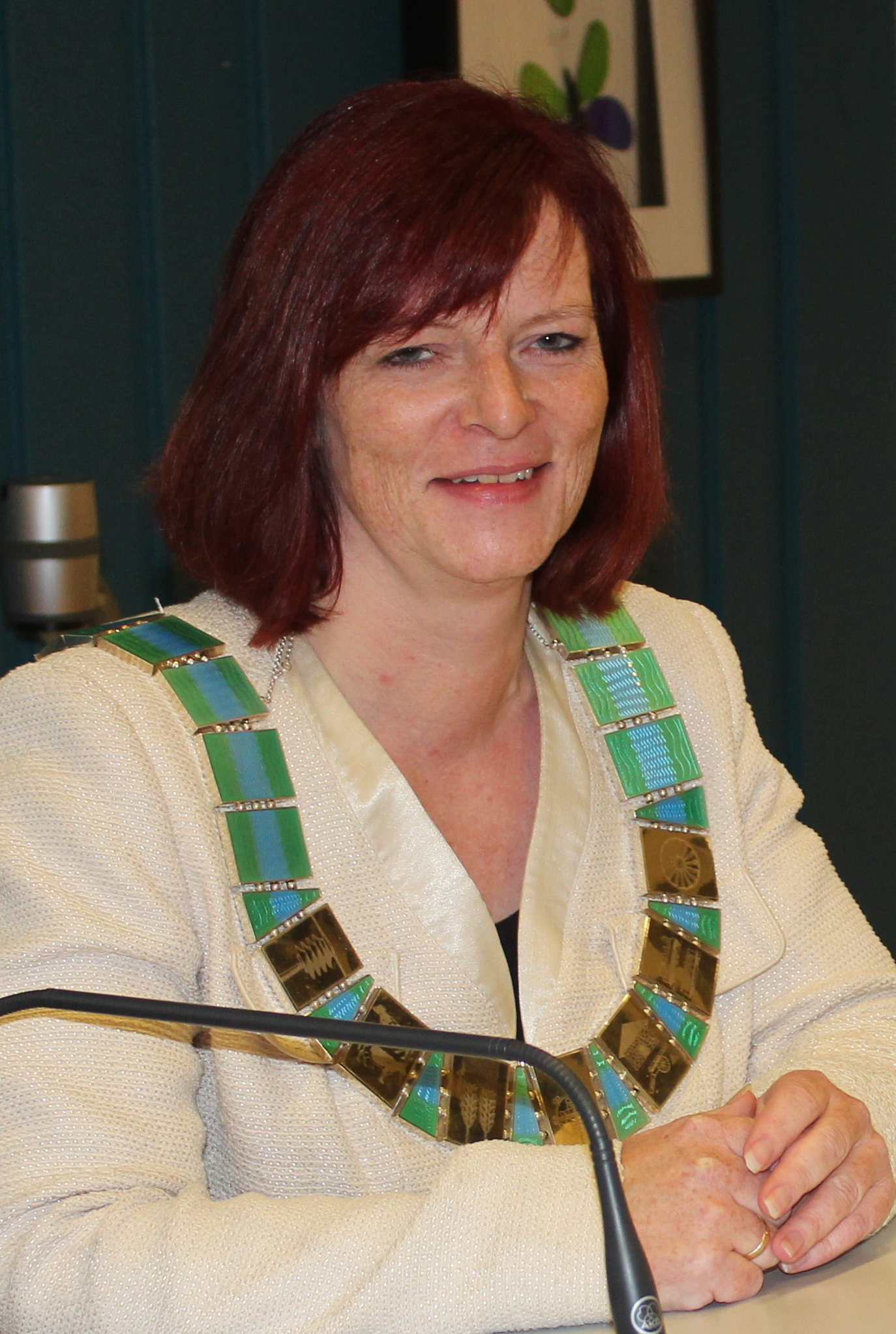 Mona Mangen. Ordfører i Sørum i 2015